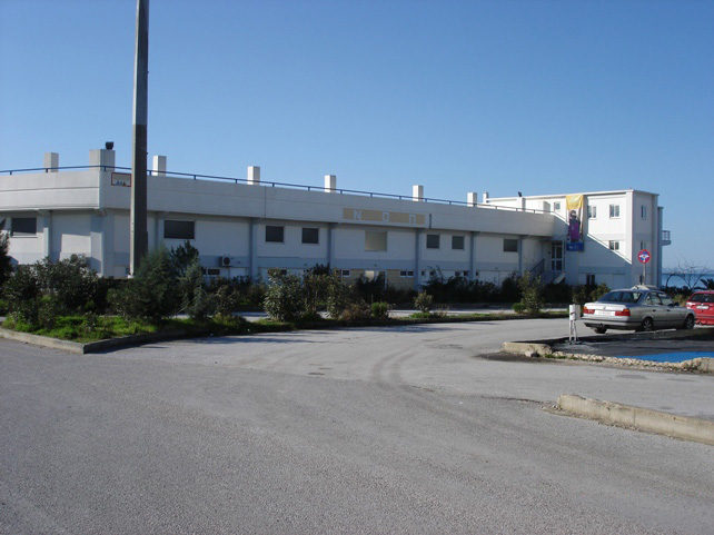 N.O. Patras nautikal center Greece